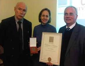 2012 04 13 Latvijoje Vincas Lapinskas